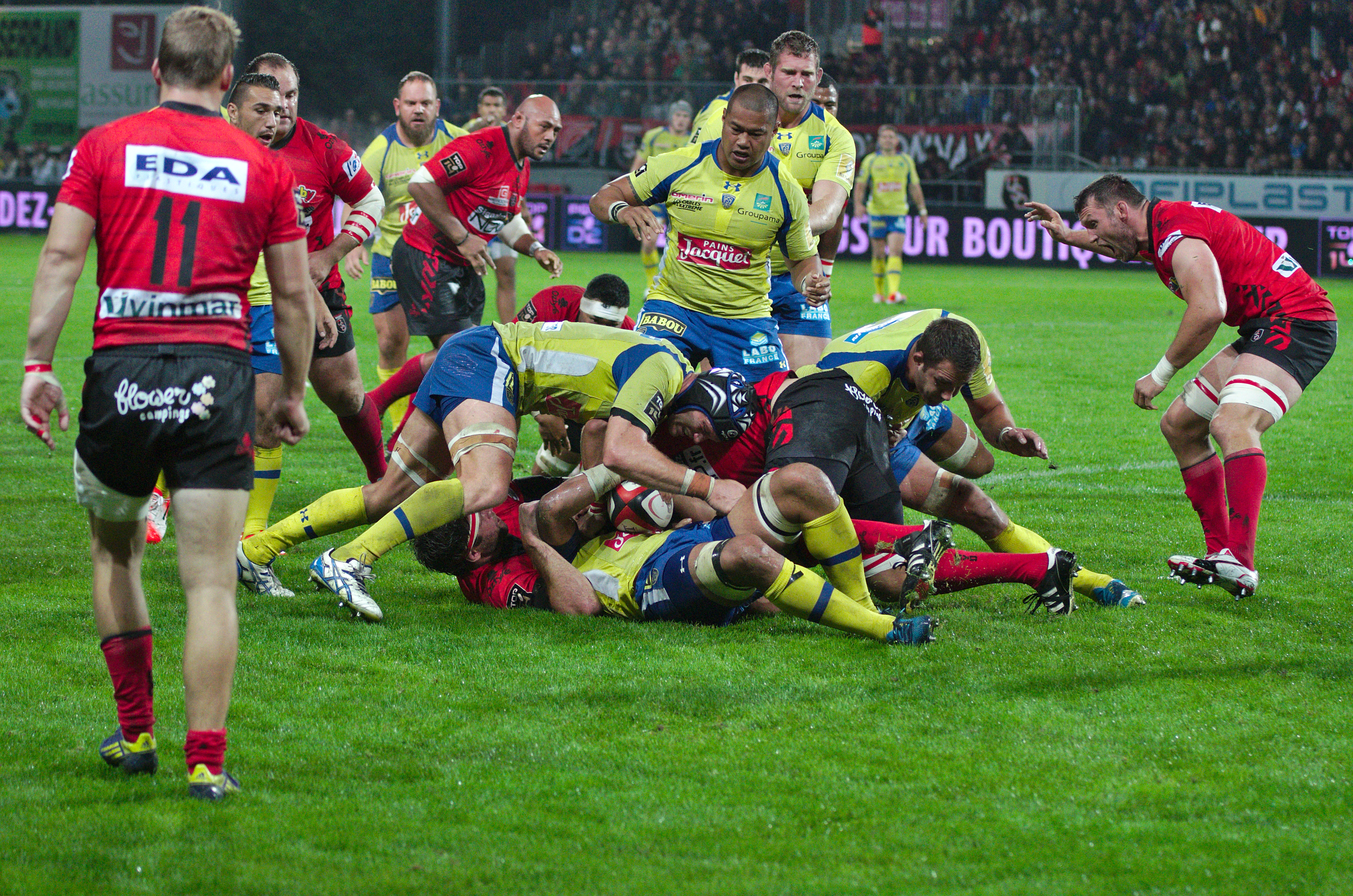 USO-ASM - 20140927 - Melée ouverte